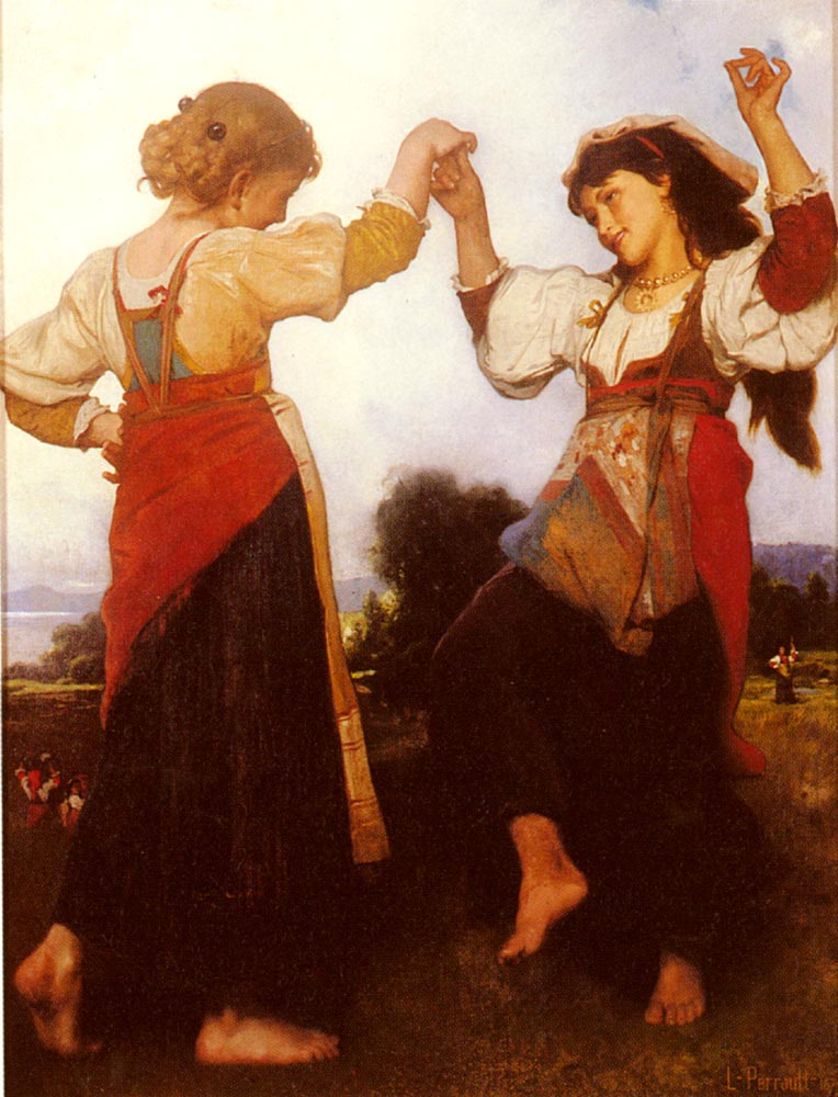 La Tarantella